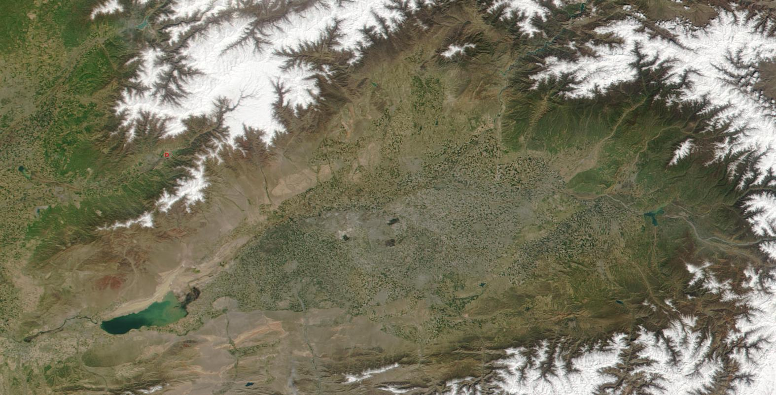 De Ferganadall mam Kairakkum-Stauséi.